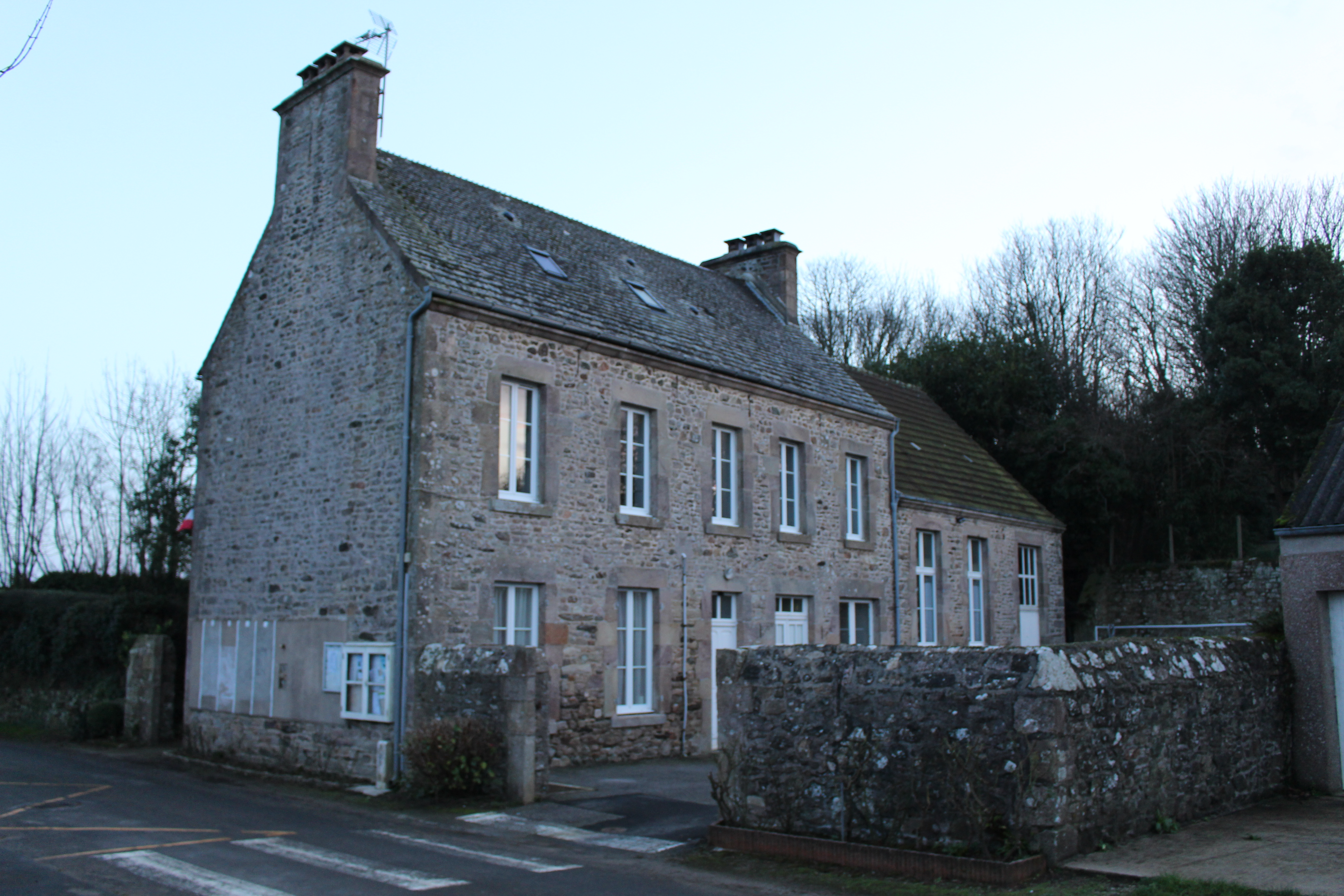 Éculleville, Manche